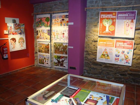 Esposición sobre les campañes de normalización llingüística en Samartín del Rei Aurelio